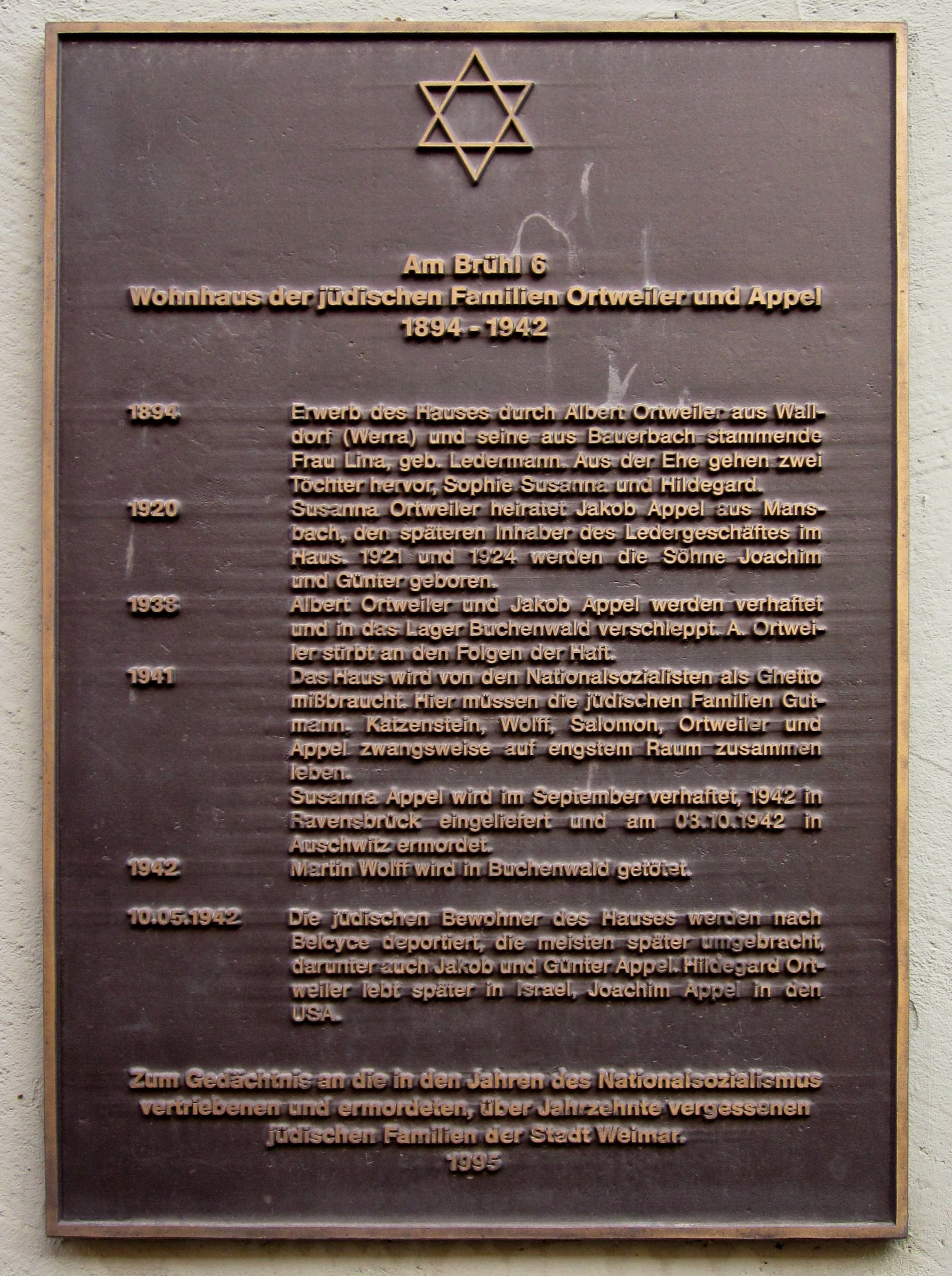 Denkmalensemble Altstadt, Gedenktafel an der Fassade, 1995, Brühl 6 in Weimar/Thüringen, (Familien Ortweiler und Appel, ehem. Bewohner des Hauses)